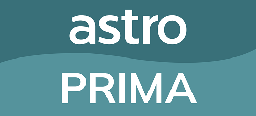 Logonya